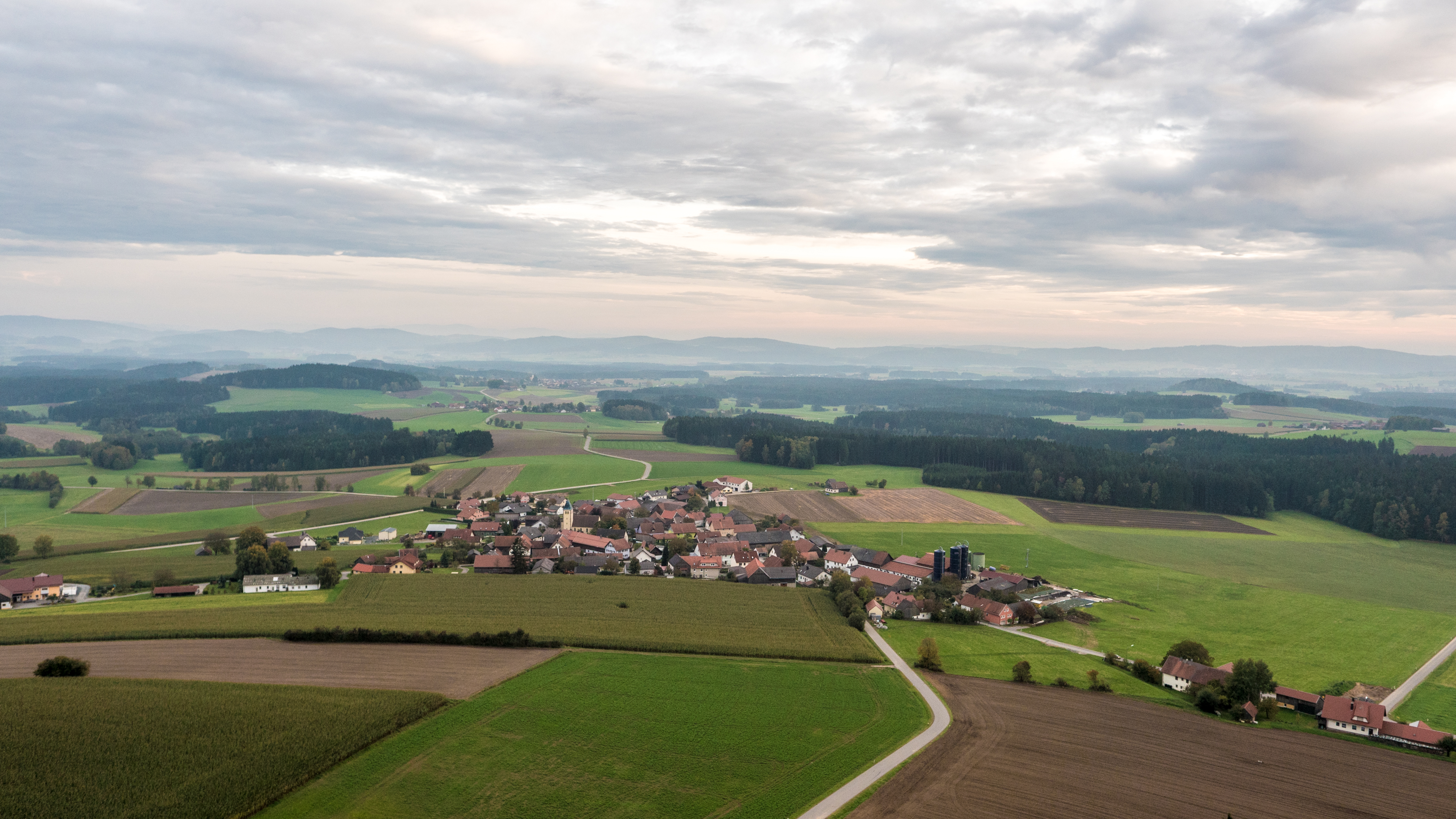 Ein Luftbild von Irlach erstellt mit dem QXXQ Flugroboter